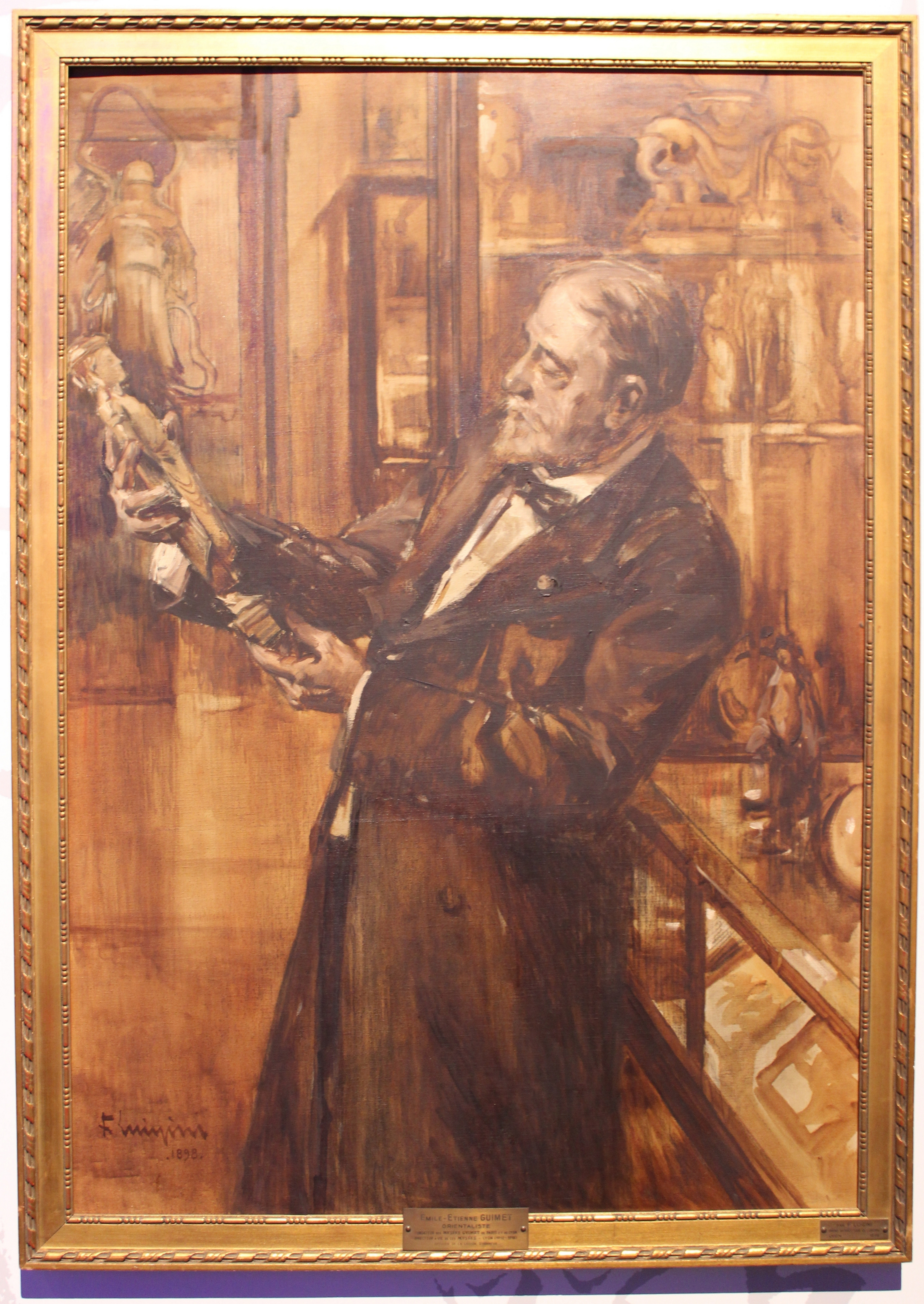 Portrait d'Émile Guimet par Ferdinand Luigini, au Musée des Confluences de Lyon.